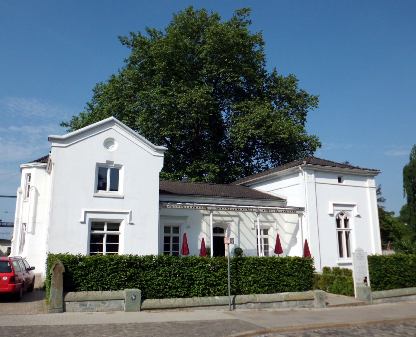 Bielefeld, Denkmalnummer 16, Villa im Tudorstail von 1852